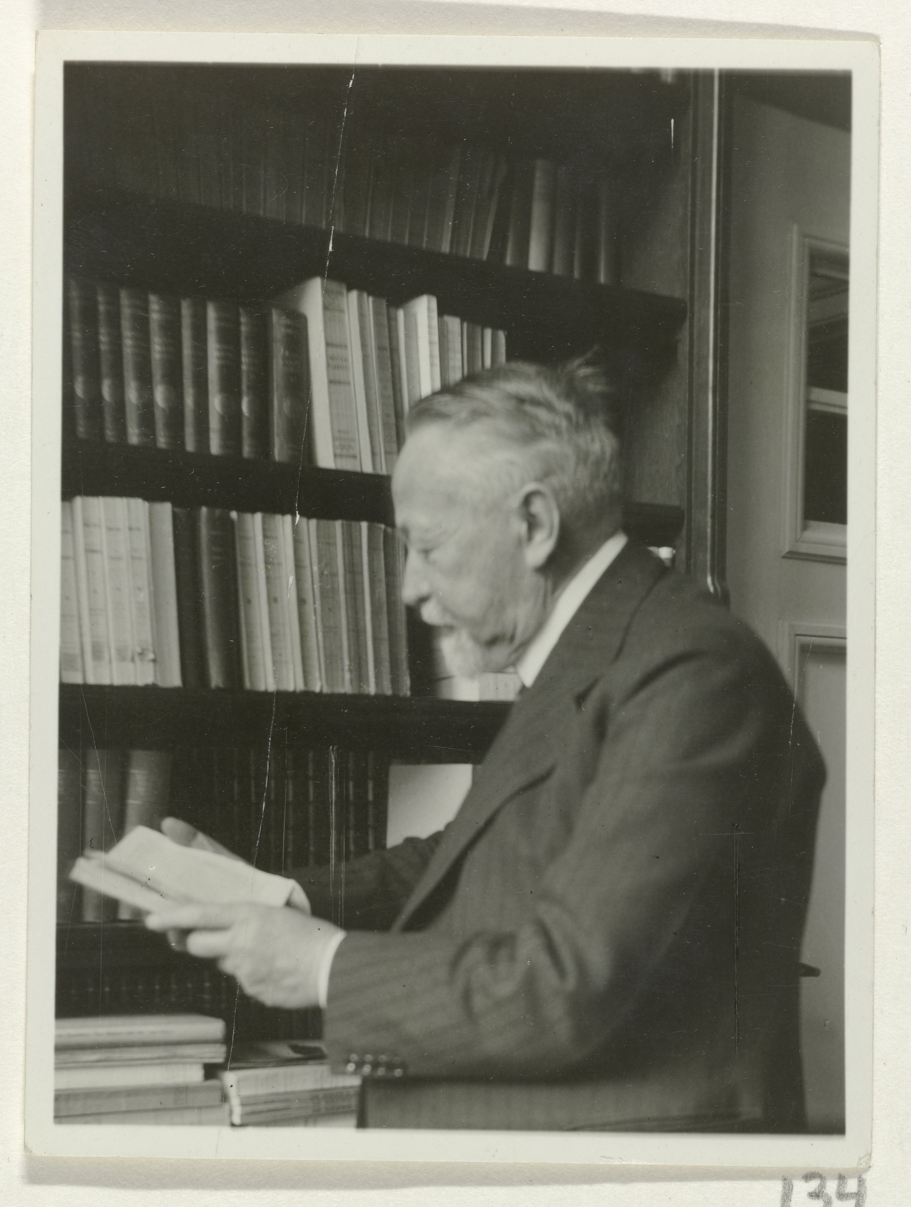 IdentificatieTitel(s): Andries Bonger, staand bij boekenkast, een boek in zijn handenObjecttype: foto Objectnummer: RP-F-00-1429VervaardigingVervaardiger: fotograaf: anoniemDatering: 1934Fysieke kenmerken: papier op kartonMateriaal: papier fotopapier karton Techniek: ontwikkelgelatinezilverdrukAfmetingen: foto: h 94 mm × b 70 mmOnderwerpWat: lezennamen van steden en dorpenother dwelling typeshistorical person (BONGER, Andries) - historical person (BONGER, Andries) portrayed aloneWaar: AmsterdamWie: Andries BongerVerwerving en rechtenCredit line: Legaat van de heer S. CrommelinVerwerving: legaat 1985Copyright: Publiek domein